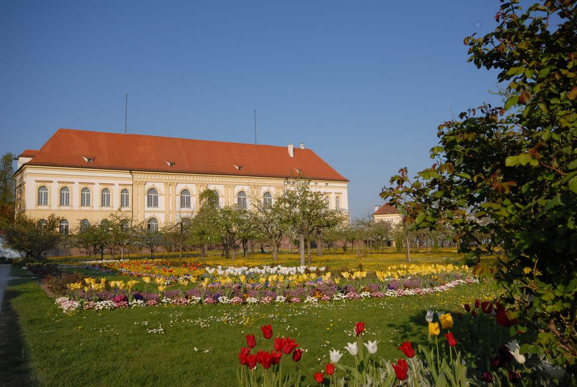 Dachau, castle (Schloss)